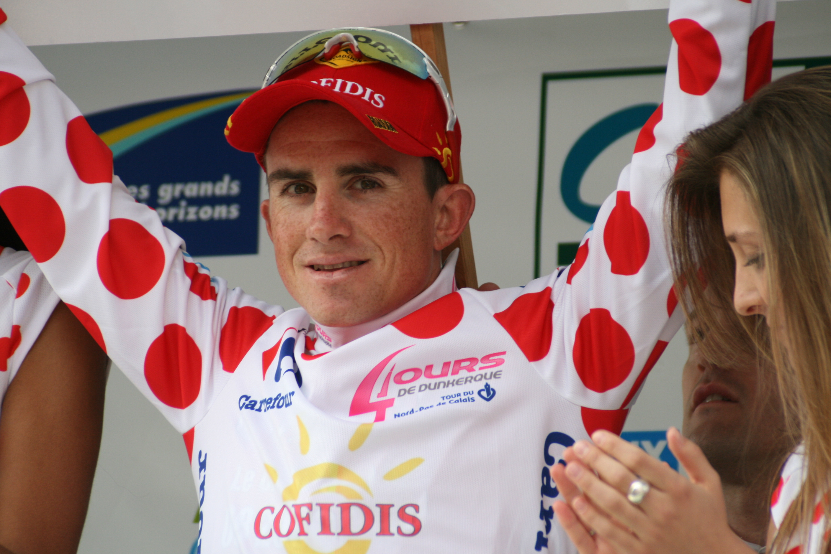 Samuel Dumoulin lors des Quatre jours de Dunkerque 2009